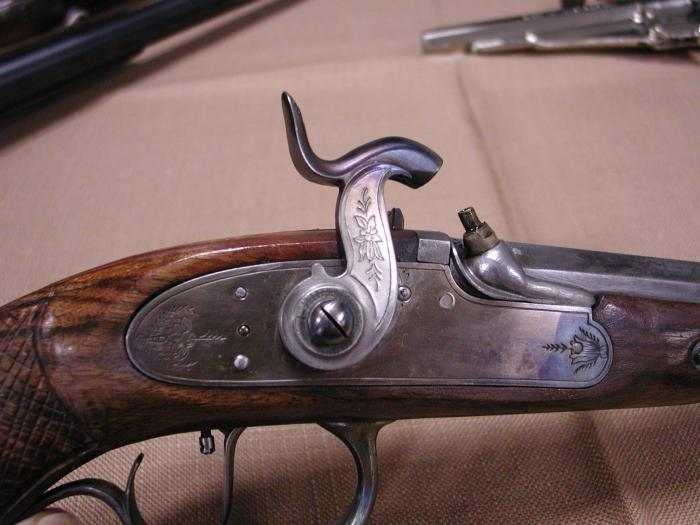 Perkussionswaffe – Perkusionsschloss der Le Page in Laderast